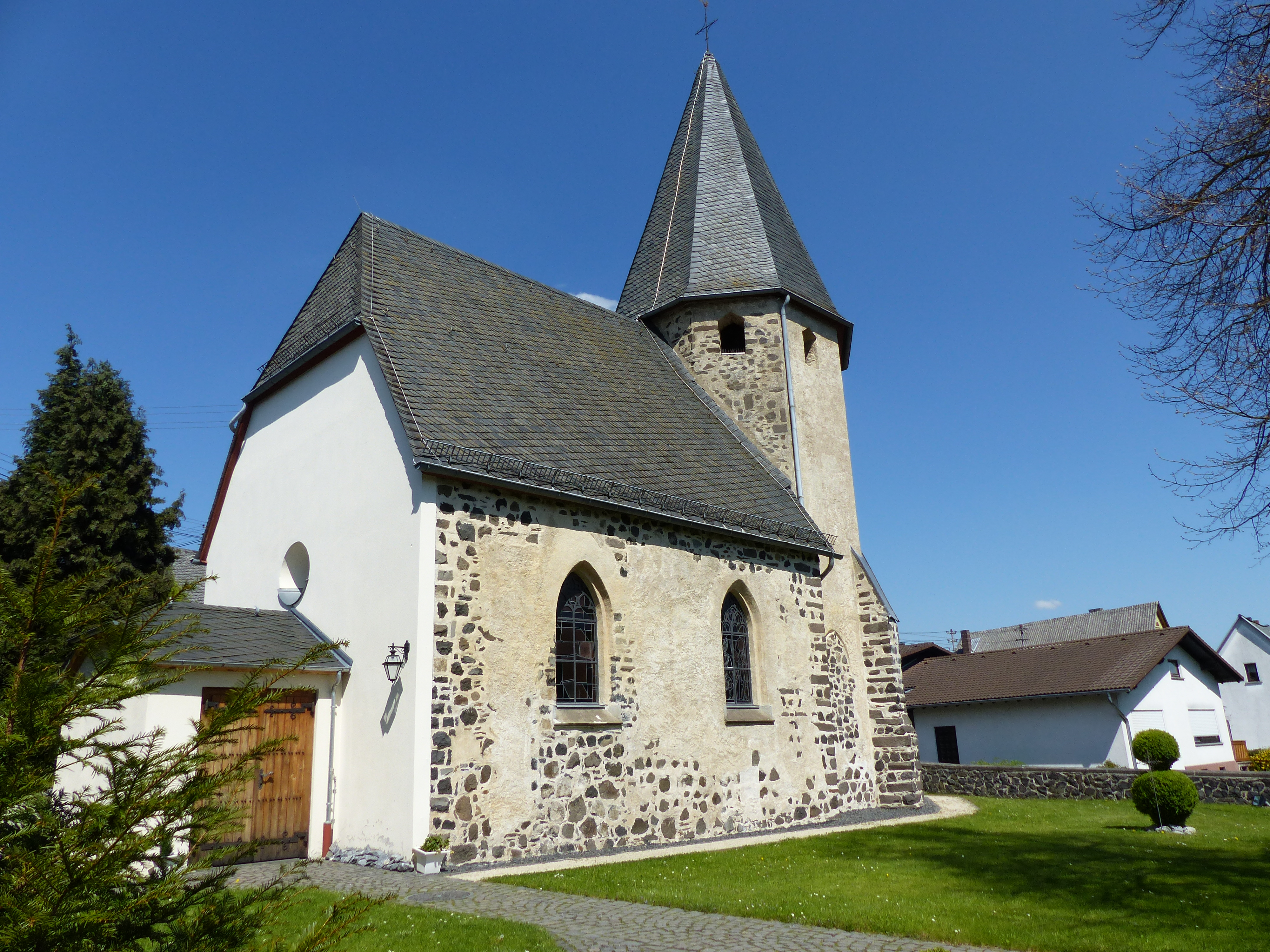 Pütschbacher Wehrkirche (Kapelle St. Antonius Abbas und Barbara) in Dreikirchen